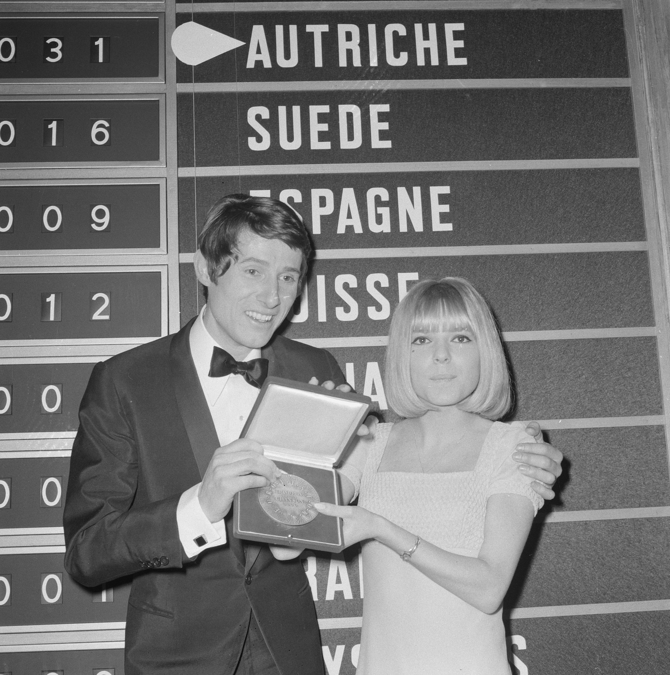 Collectie / Archief : Fotocollectie Anefo Reportage / Serie : [ onbekend ] Beschrijving : Eurovisie Songfestival 1966 te Luxemburg. De winnaar Udo Jürgens met de winnares van 1965 France Gall Datum : 6 maart 1966 Locatie : Luxemburg Trefwoorden : artiesten, muziek, songfestivals, zangeressen, zangers Persoonsnaam : Gall, France, Jürgens, Udo Fotograaf : Dam, Bob van / Anefo Auteursrechthebbende : Nationaal Archief Materiaalsoort : Negatief (zwart/wit) Nummer archiefinventaris : bekijk toegang 2.24.01.03 Bestanddeelnummer : 918-9215